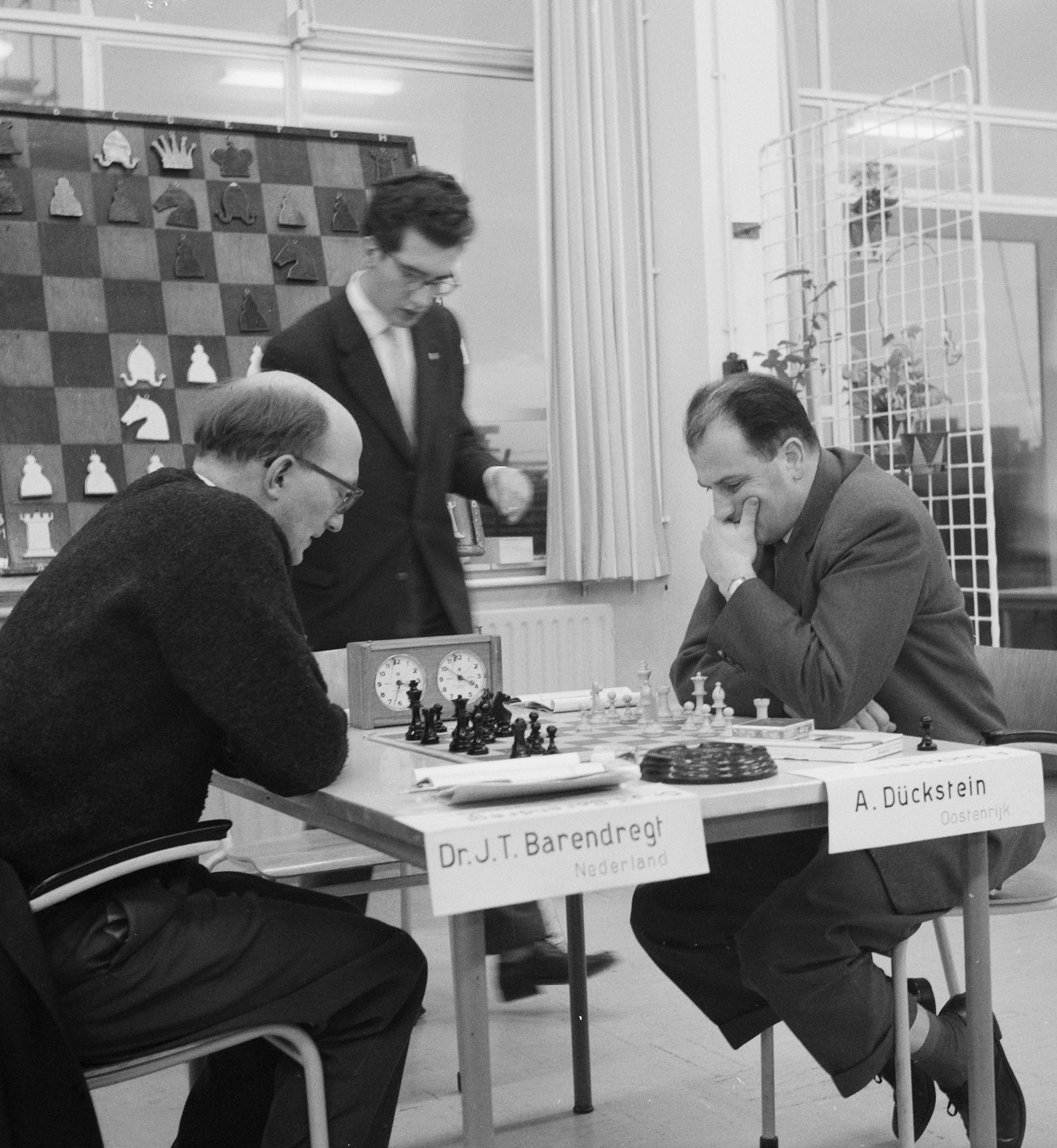 Zone-schaaktoernooi te Berg en Dal, Barendregt tegen Duckstein